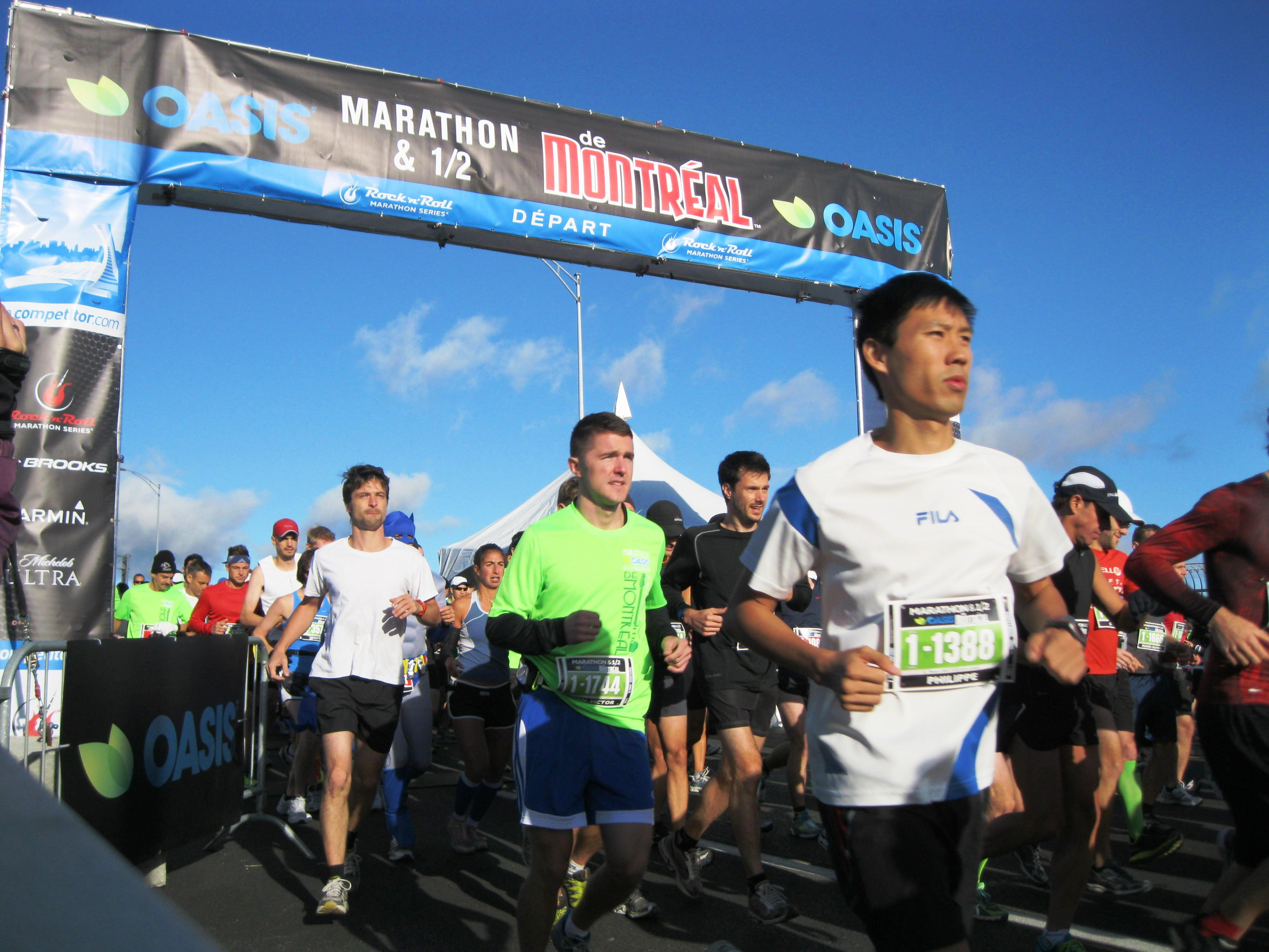 Marathon de Montréal